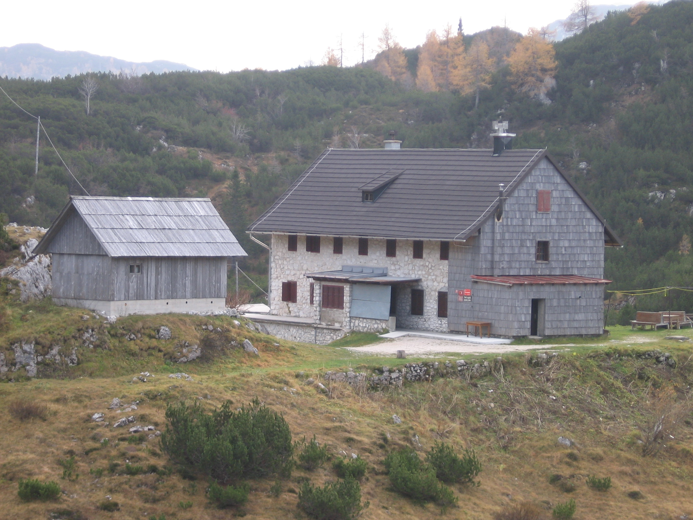 Hut under mt. Bogatin, Julian Alps